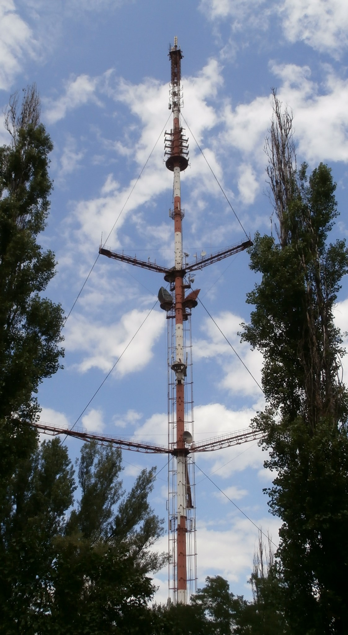 Funkmast von Krywyj Rih